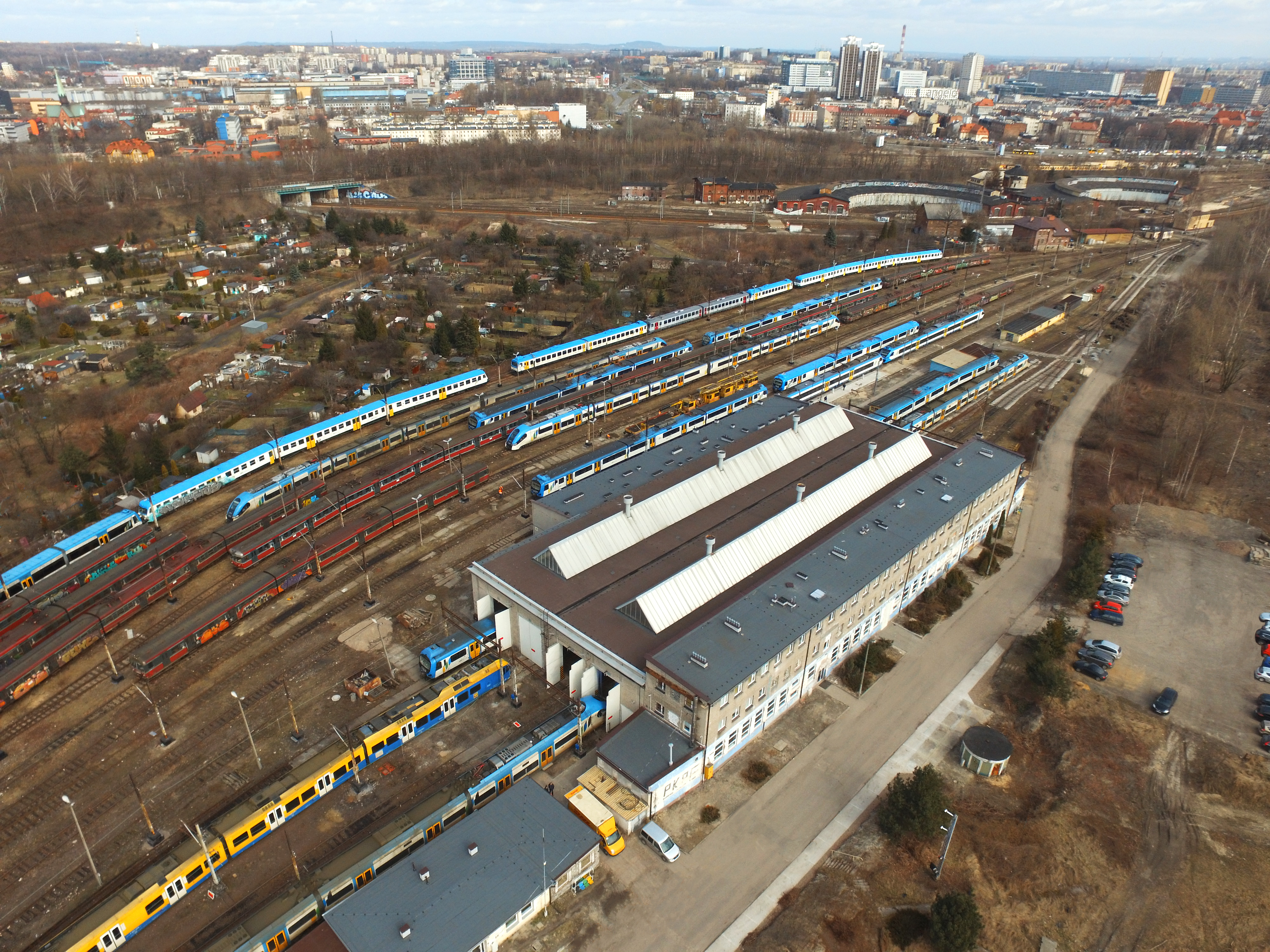 Siedziba spółki Koleje Śląskie przy ulicy Raciborskiej w Katowicach. Na pierwszym planie budynek A - administracyjny, hala taboru, oraz tory odstawcze. W tle panorama śródmieścia Katowic